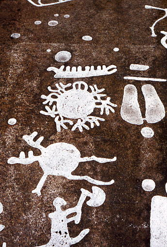 Gravure préhistorique de la région de Tanum